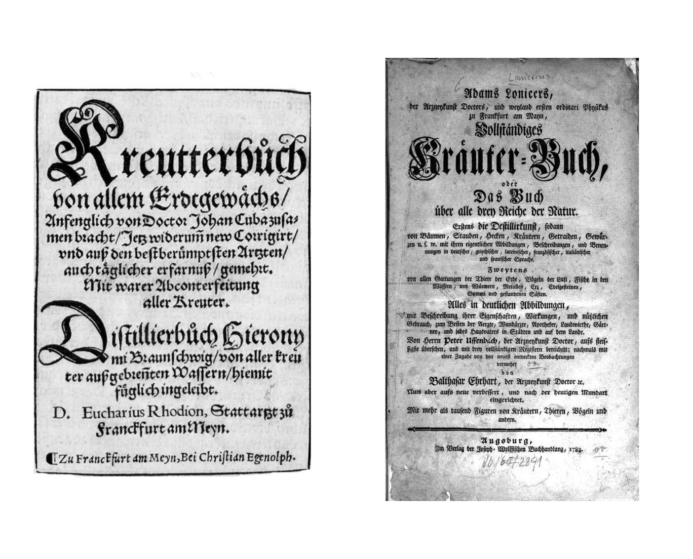 Titelseiten